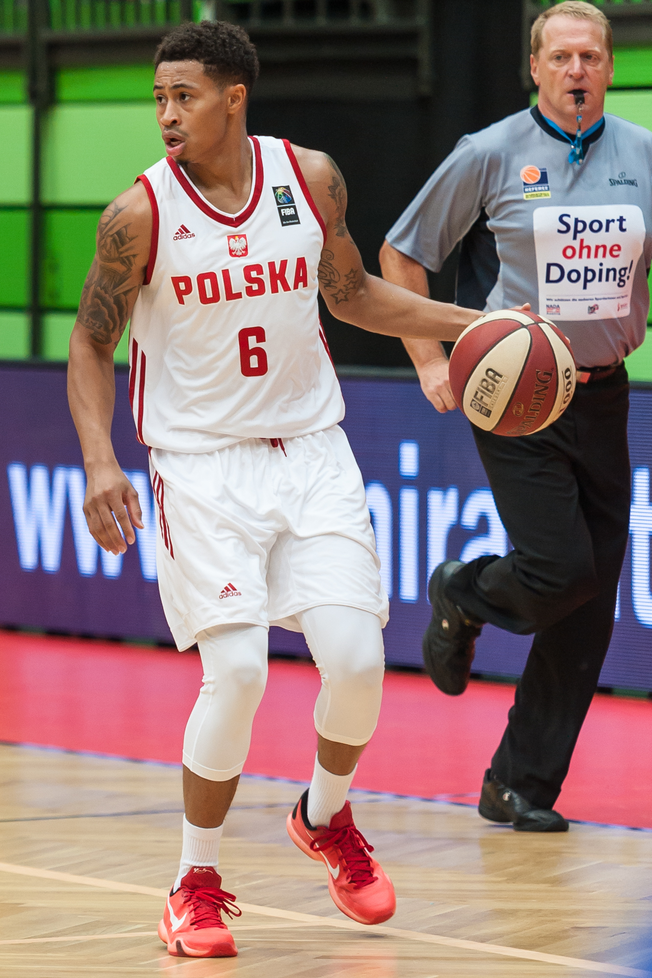 ÖBV Vier-Nationen-Turnier vom 12.-14. August 2016 in Schwechat: Polen vs Island. Bild zeigt A. J. Slaughter (POL).